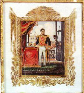 Cuadro del general Rafael Carrera, fundador de la República de Guatemala.